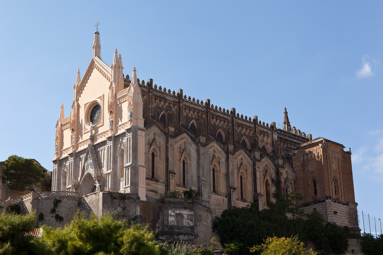 Duomo